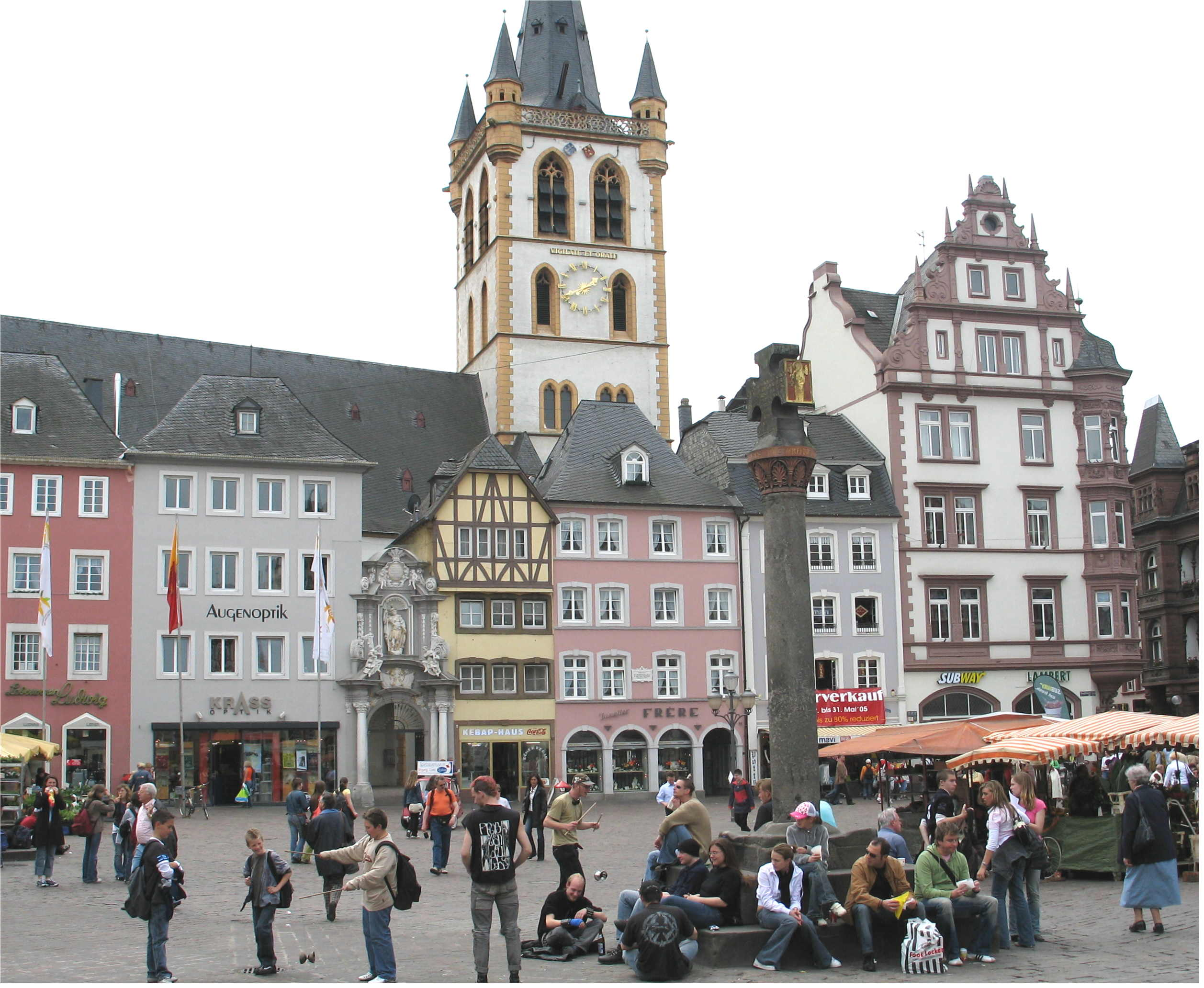 Zu Tréier op der Maartplaz Kategorie:Tréier